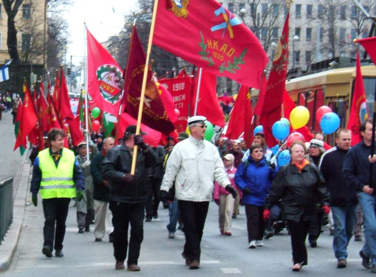 Työväen vappukulkue Helsingissä 2005